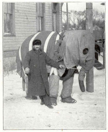 Elefant im Winteranzug bei minus 20° im Tierpark Hagenbeck, Hamburg.